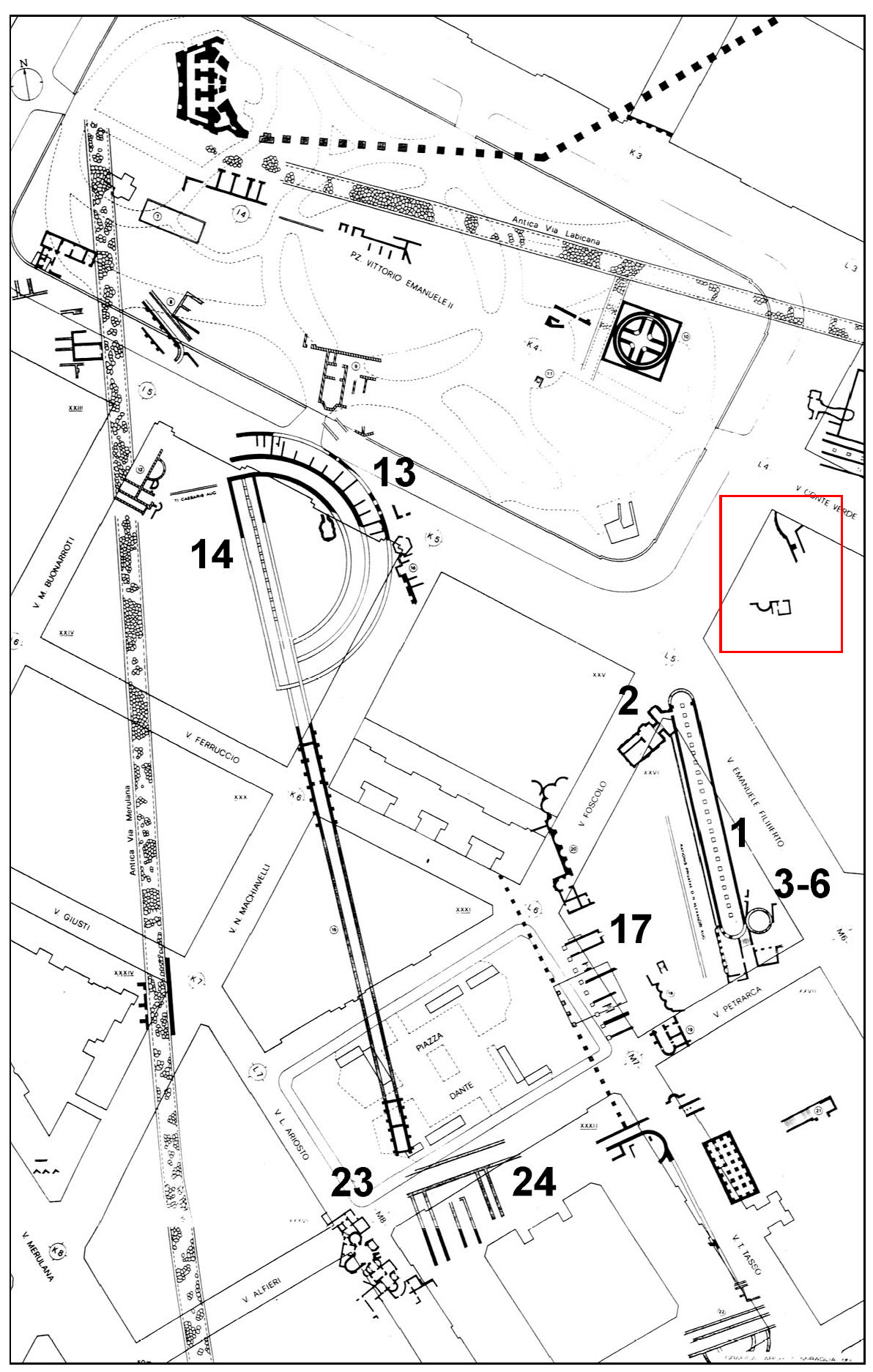 Planietria ricostruttiva degli Horti Lamiani